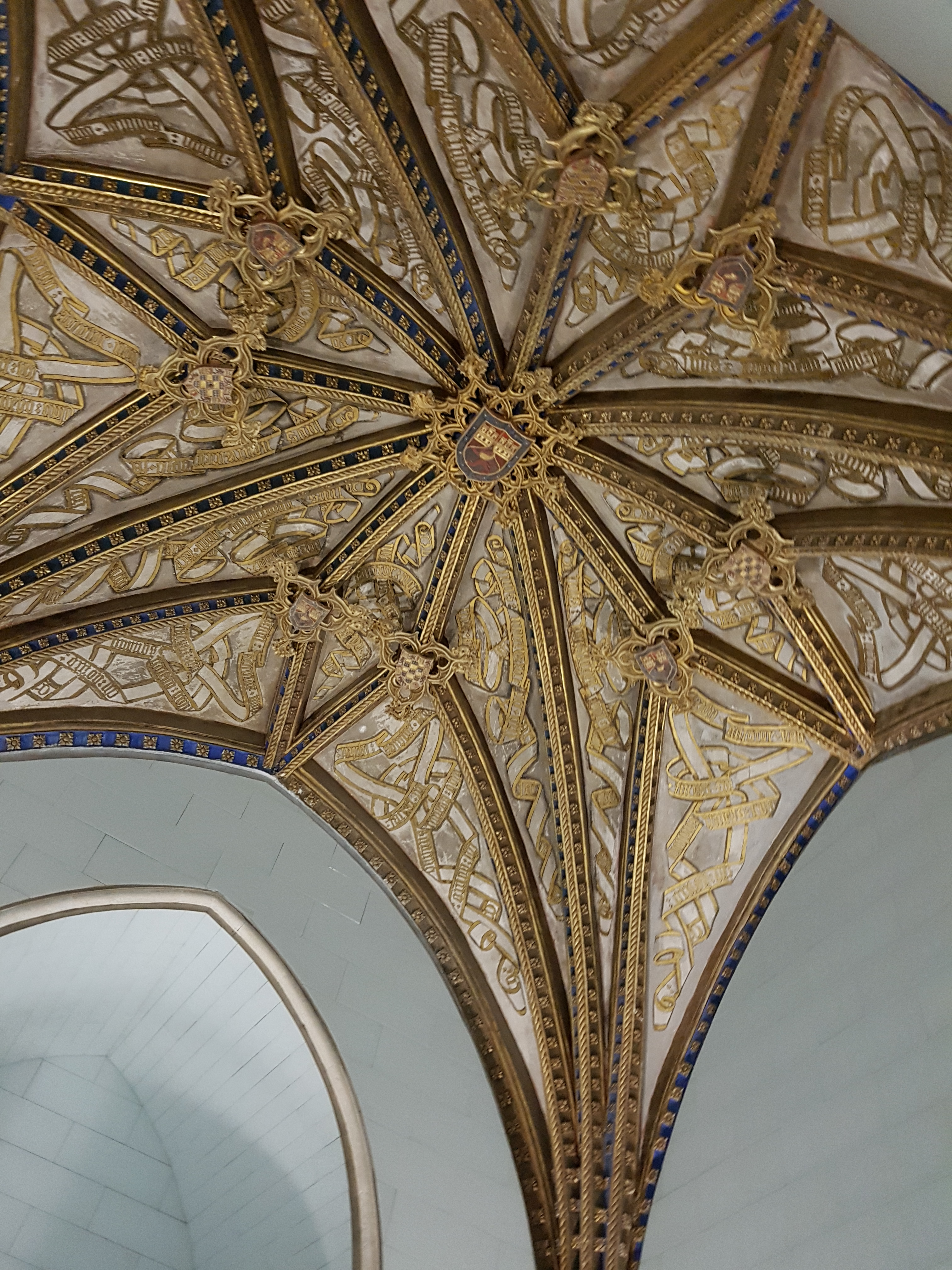 Artesonado del Archivo General de Simancas